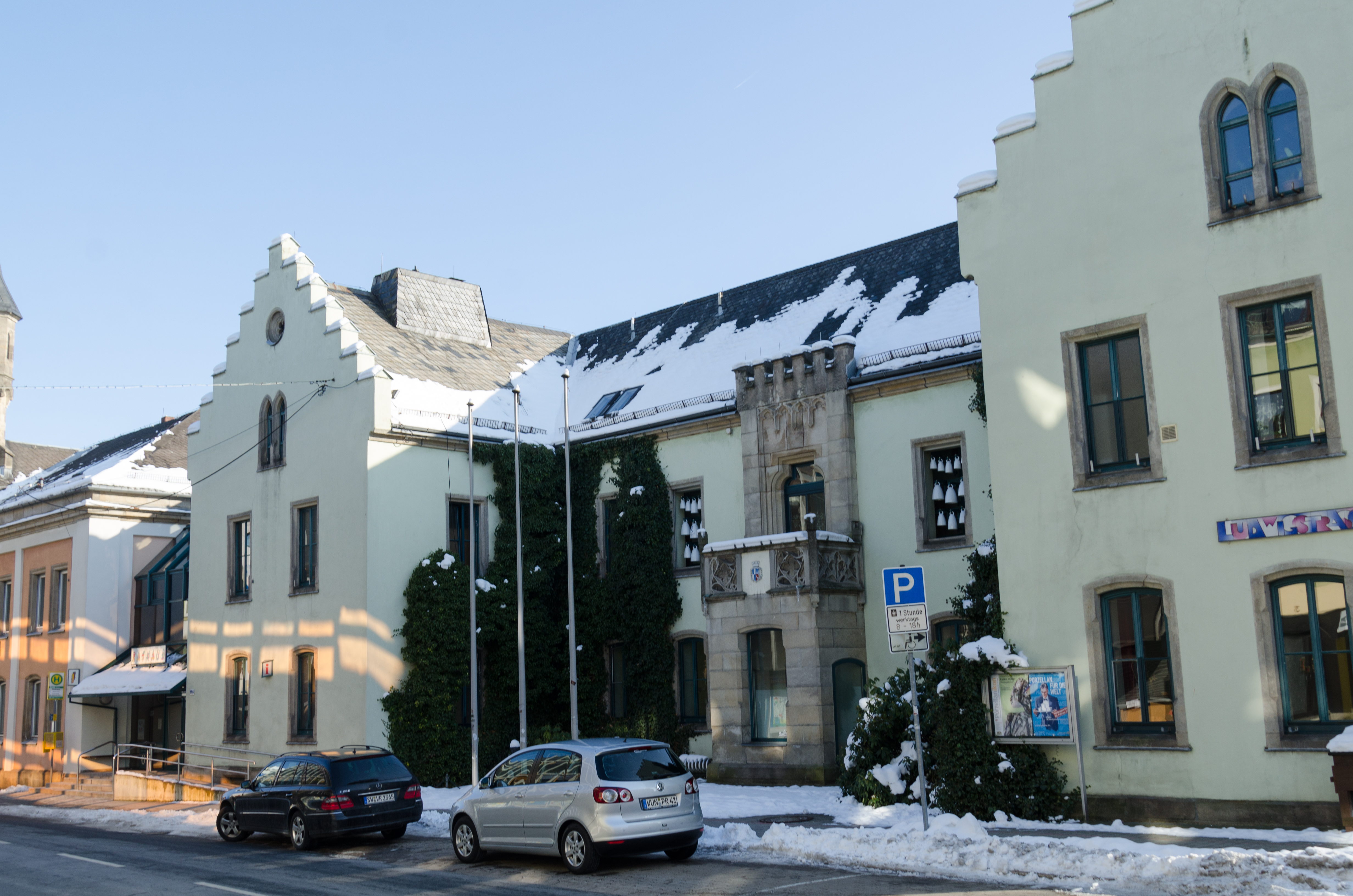 Selb, Ludwigstraße 4